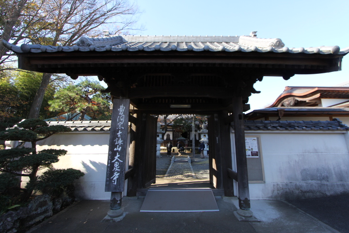 静岡県沼津市 大泉寺山門